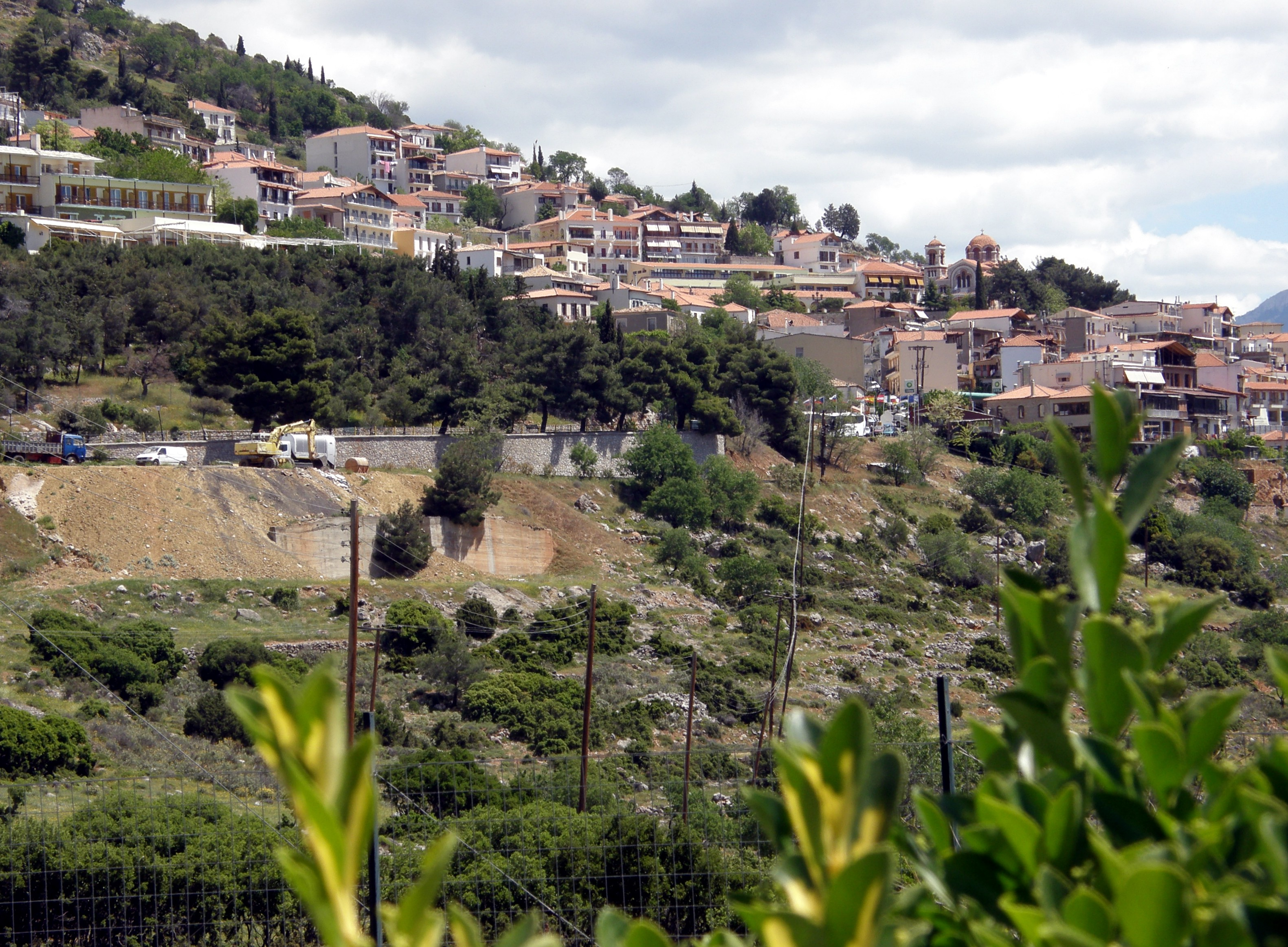 Gesamtansicht des Ortes Delphi (1)